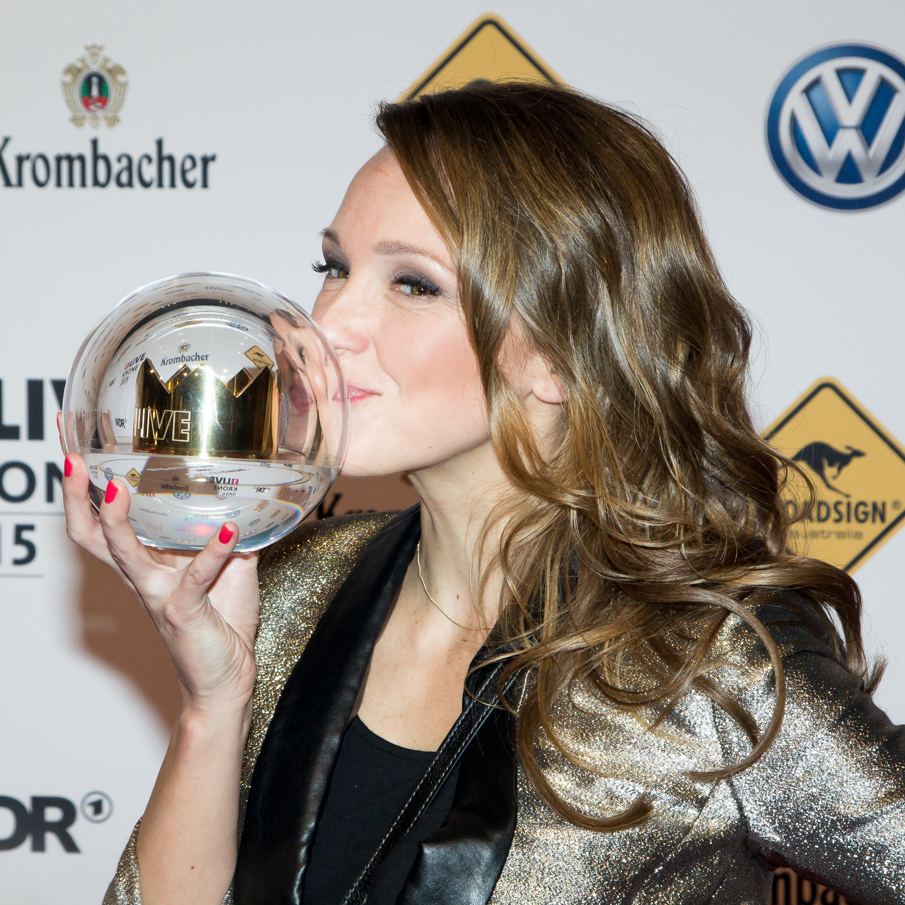 1lIVE Krone 2015 - Carolin Kebekus